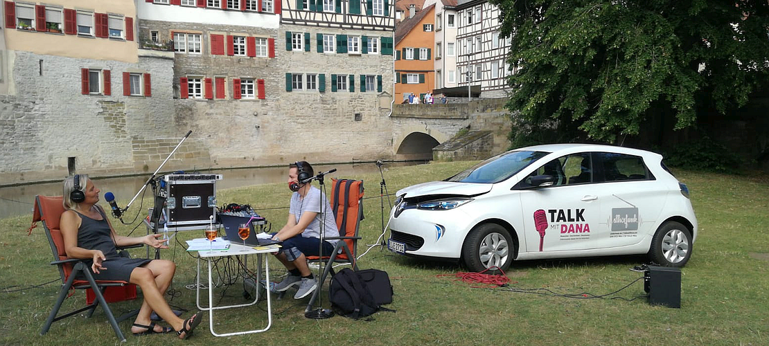 3 Stunden Radio zum Anschauen. Talk über Radioleidenschaft, Technik und Möglichkeiten.